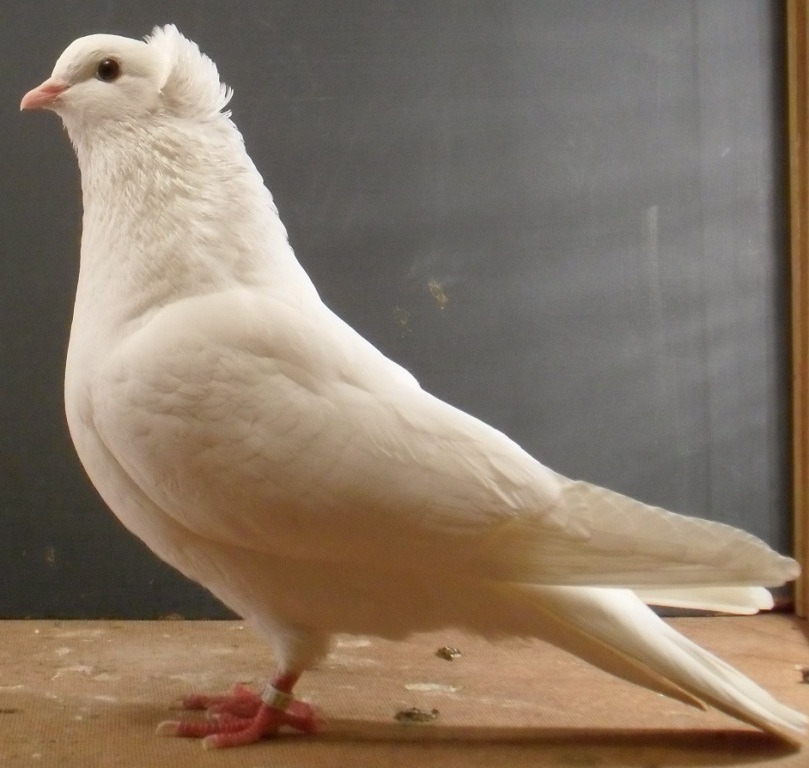 Anatolier weiß